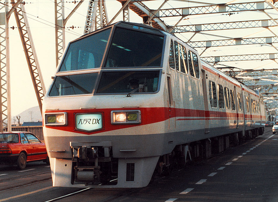 名古屋鉄道 8800系「パノラマDX」